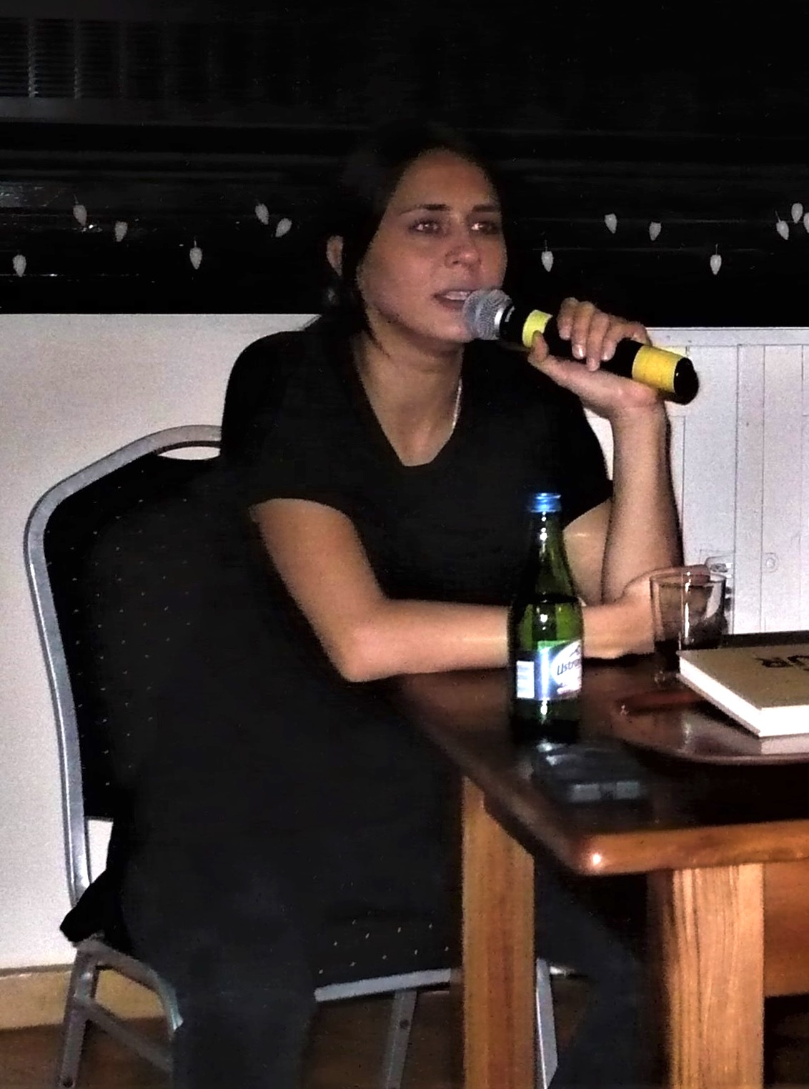 Jagoda Szelc podczas Festiwalu Góry Literatury, 15.07.2018